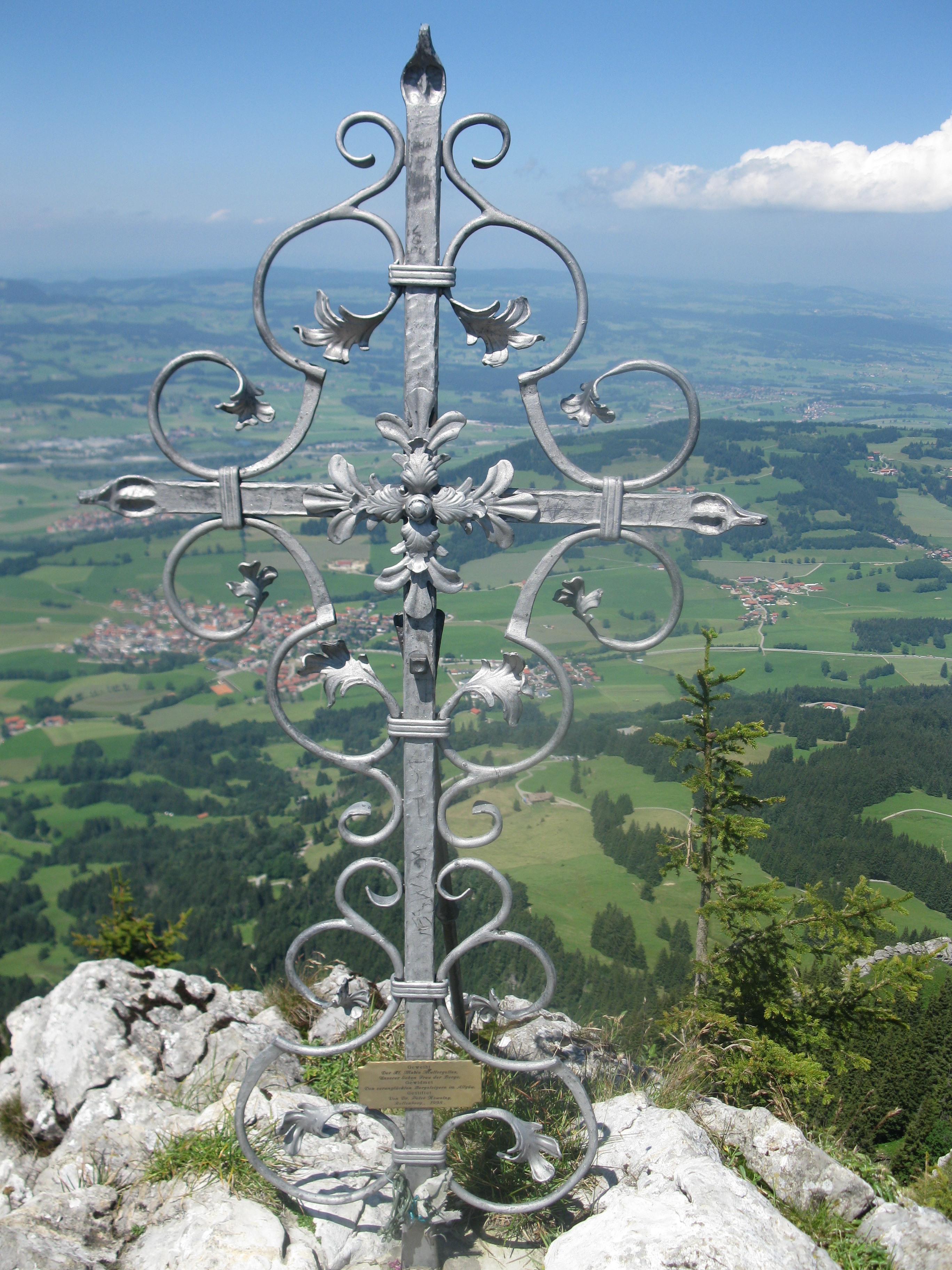 Kreuz am Gipfel des Grünten. Das Gipfelkreuz (Bild rechts) trägt die Aufschrift: "Geweiht Der Hl. Maria Muttergottes, Unserer lieben Frau der Berge. Gewidmet Den verunglückten Bergsteigern im Allgäu. Gestiftet Von Dr. Peter Nowotny, Rettenberg, 1998"